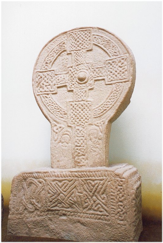 Croes Cynfelin (Conbelin), Margam, de Morgannwg. 10ed ganrif.